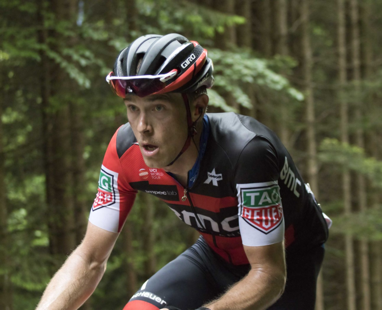 GIR10079 dennis